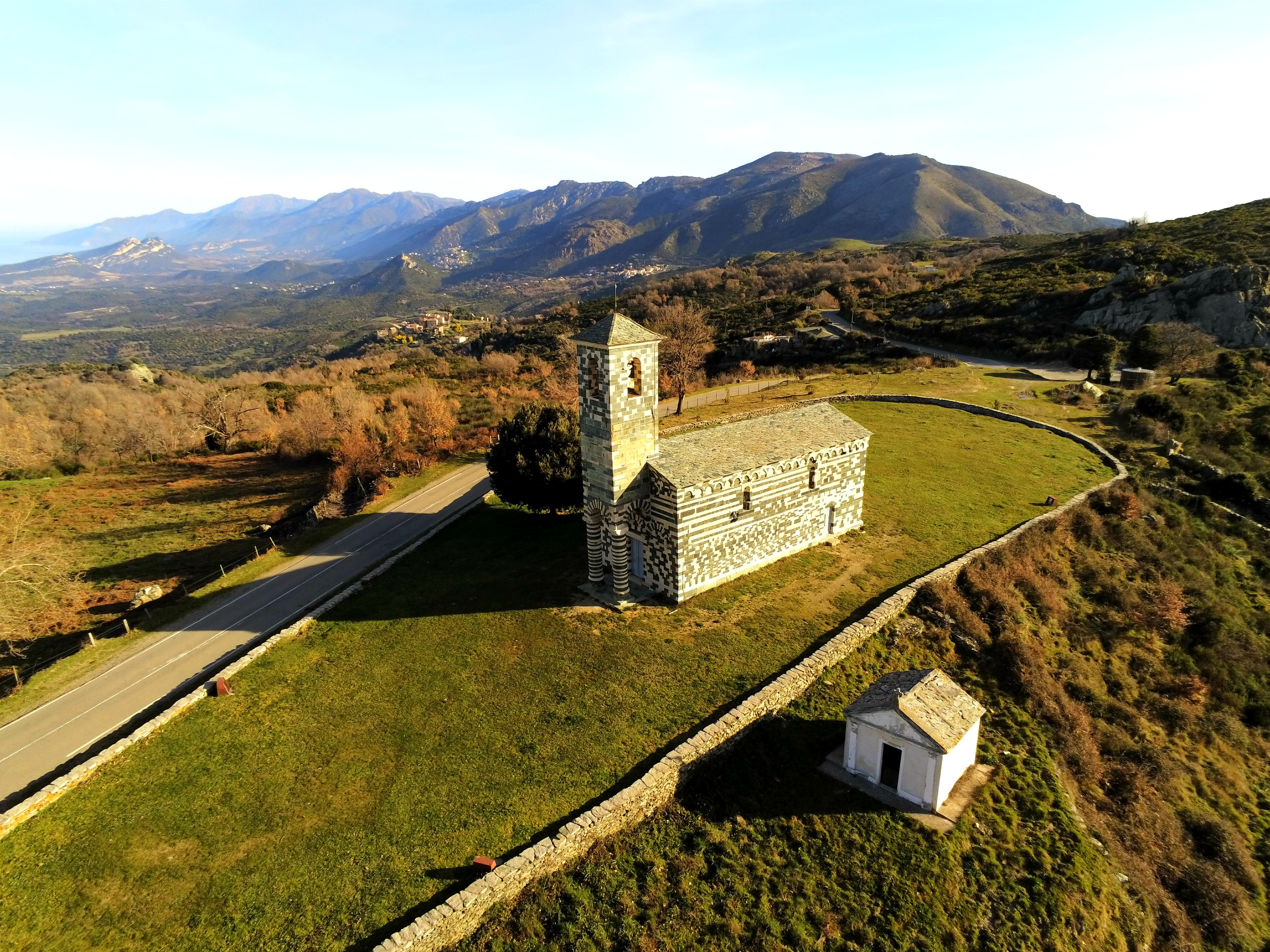 Eglise de murato